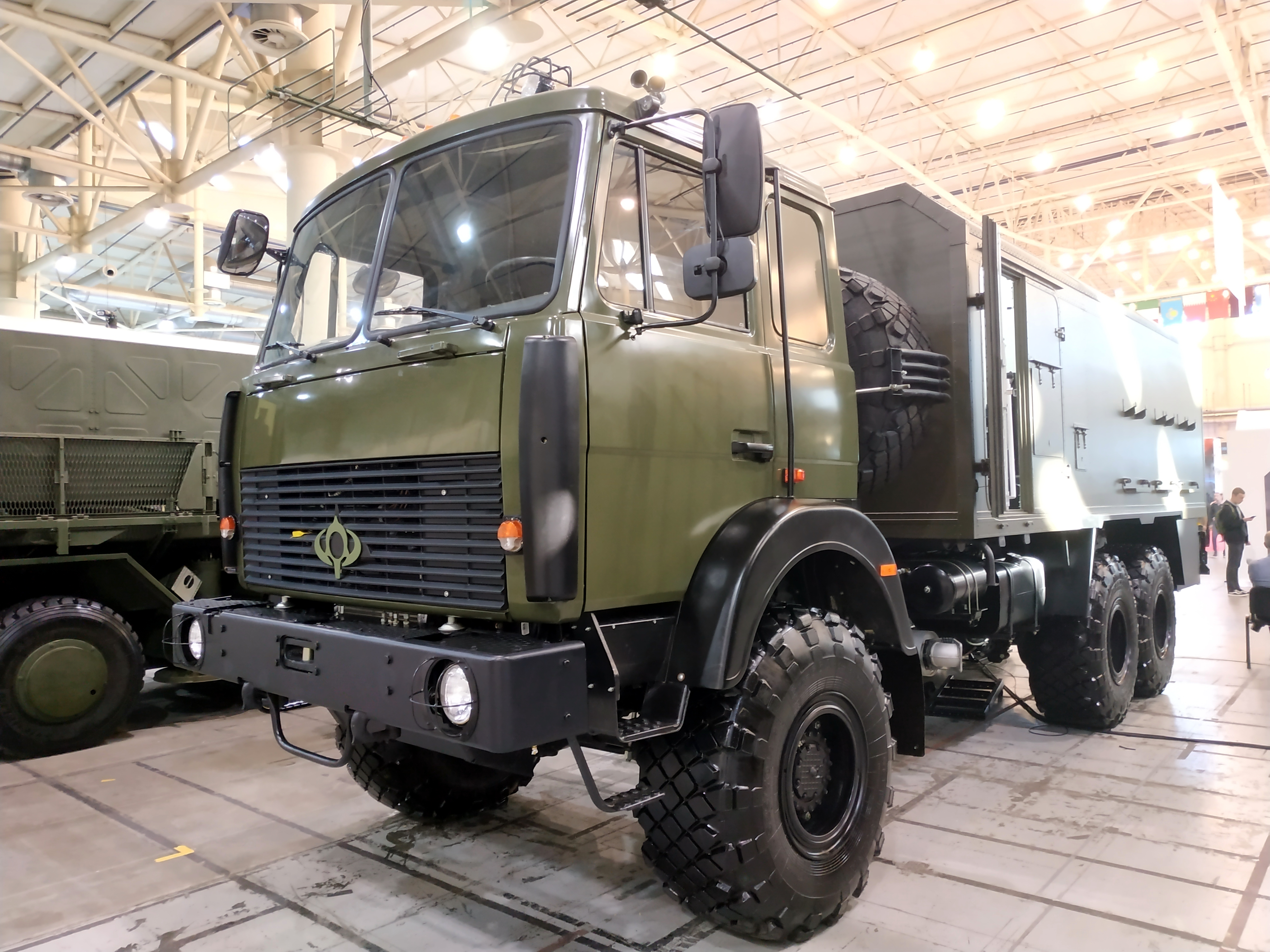 Специальная машина из состава РЛС П-18MR на шасси Богдан-6317. Выставка "Зброя та безпека", Киев, октябрь 2018 г.